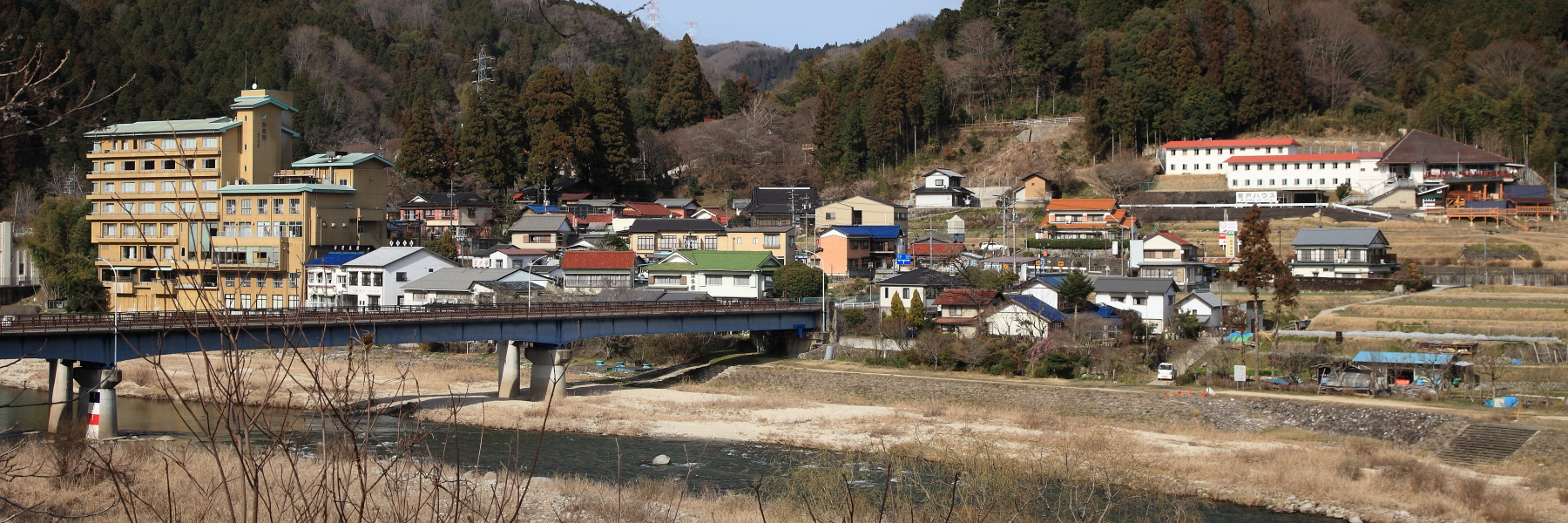 笹戸町の風景（豊田市笹戸町、2012年）